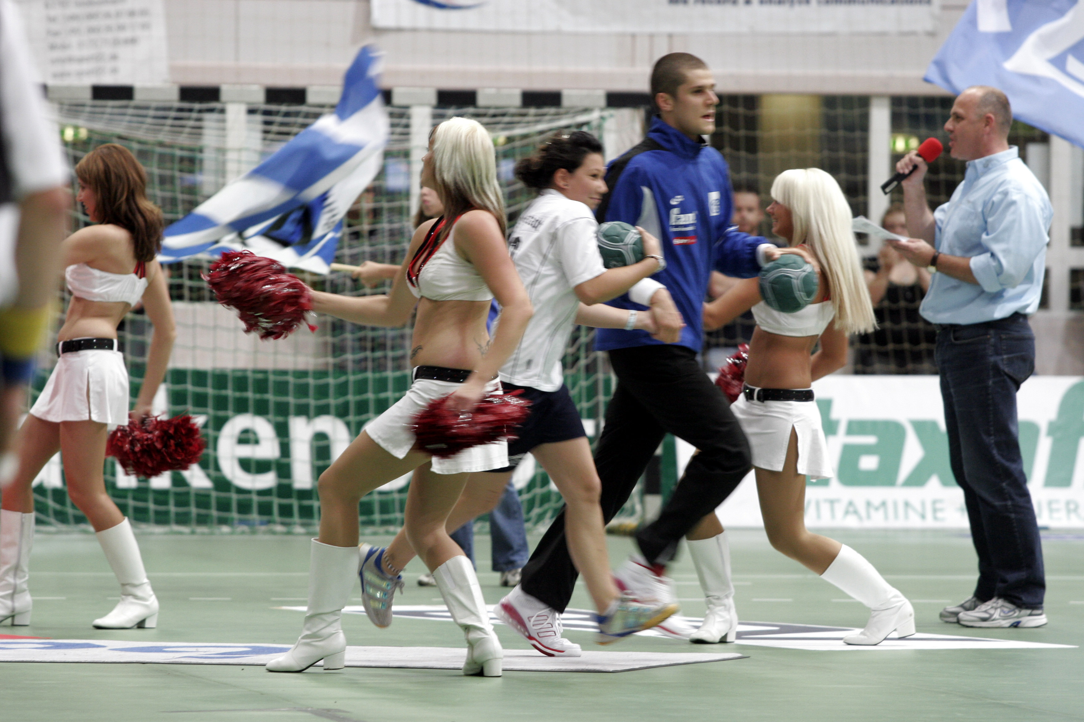 Das Auflaufen der Spieler des TV Großwallstadt vor einem Spiel, am 1. September 2007 in Aschaffenburg (TV Großwallstadt - THW Kiel)